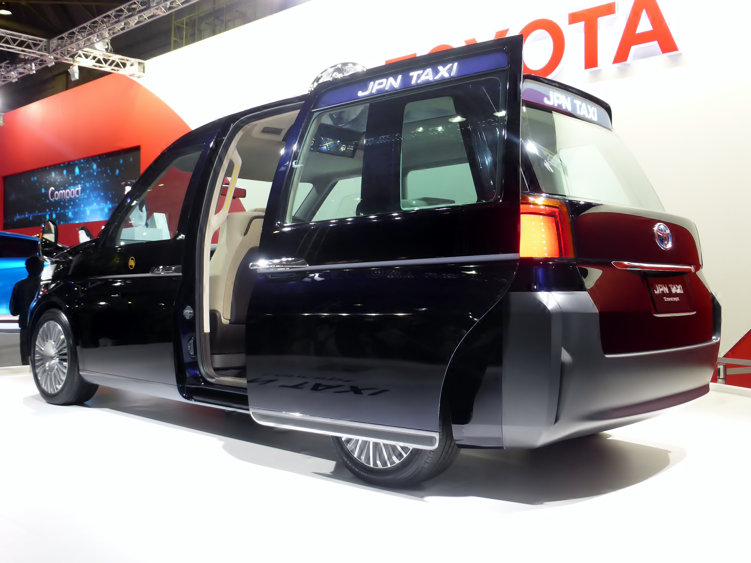 大阪モーターショー2013のトヨタブースにおいてジャパンタクシーコンセプトを撮影。